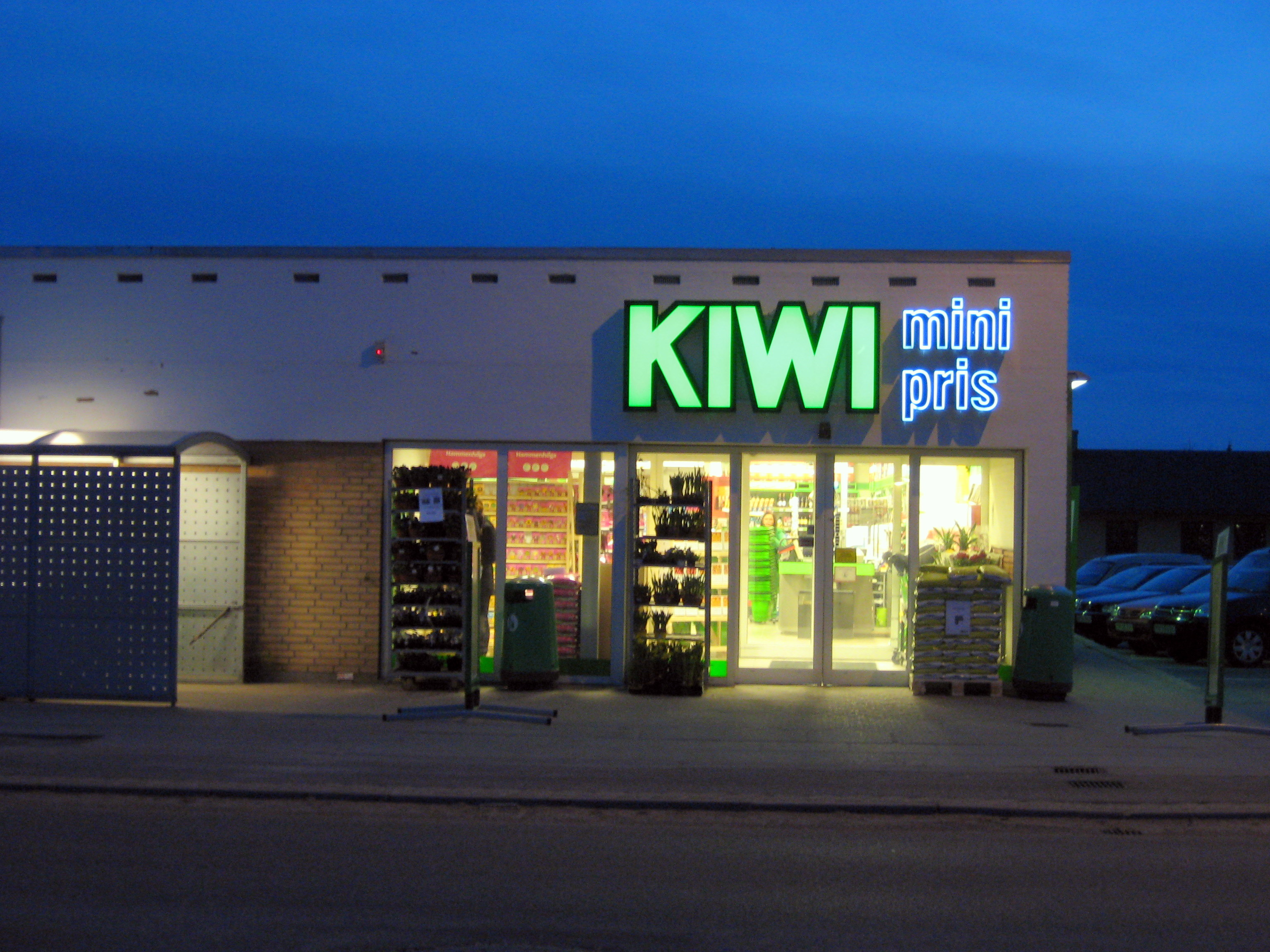 KIWI Minipris (en discountkæde), butikken i Hjørring